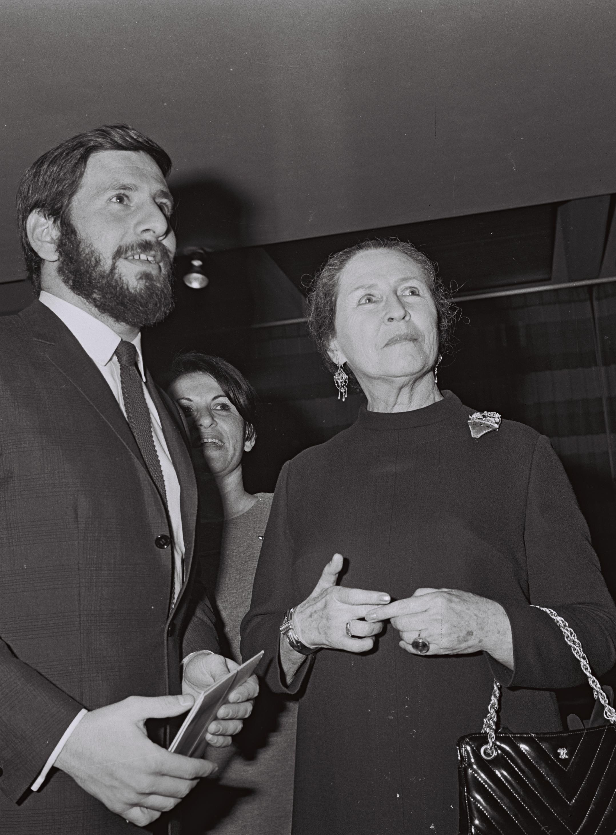 HAIM TOPOL WITH HANA ROBINA BEFORE THE INAUGURATION DINNER OF THE VARIETY CLUB OF ISRAEL AT THE HILTON TEL AVIV. חיים טופול וחנה רובינא בחנוכת מועדון וראיטי במלון הילטון בתל אביב Photo: BRUNER ILAN, 11/05/1967